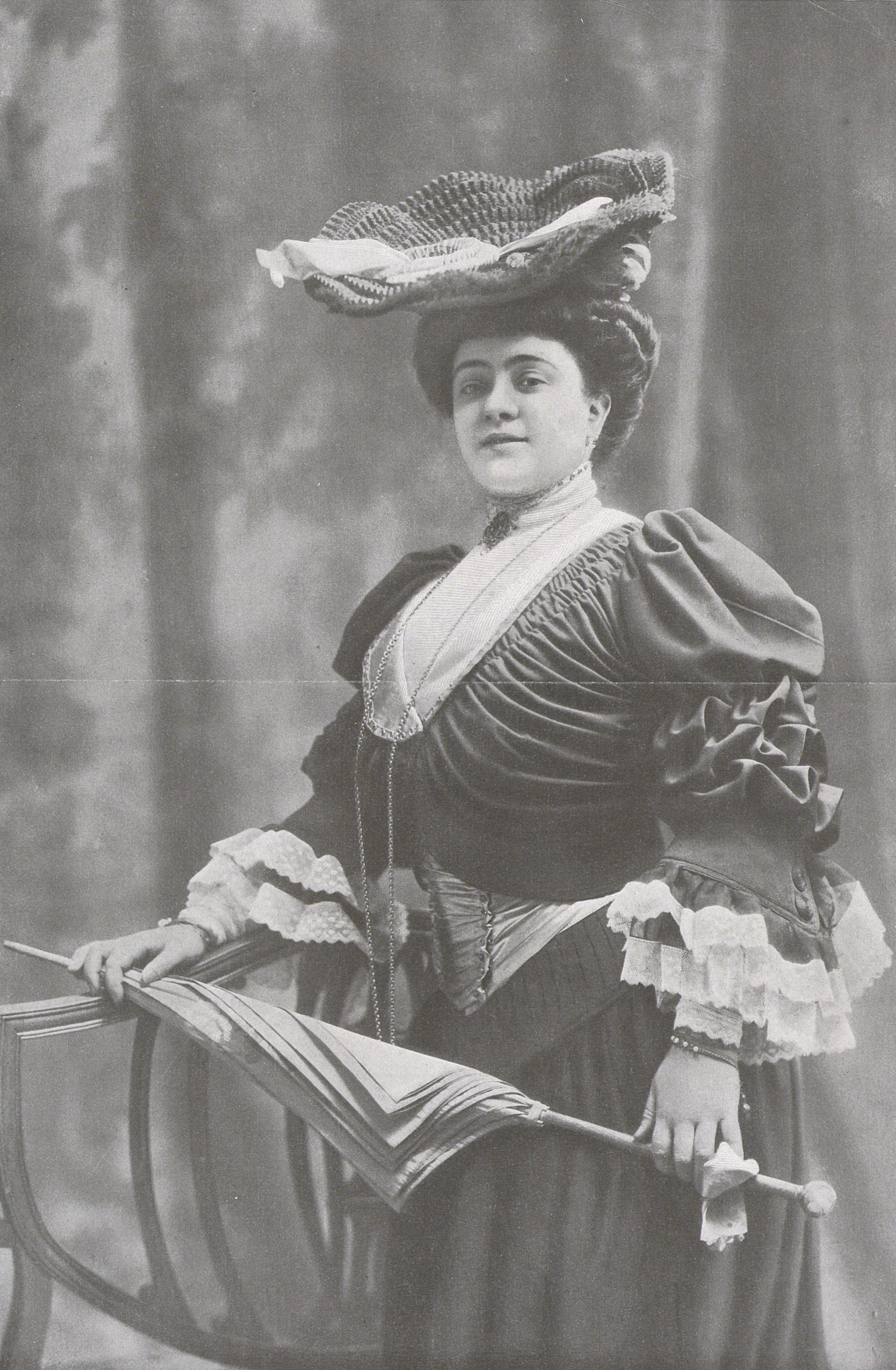 Isabel Brú.